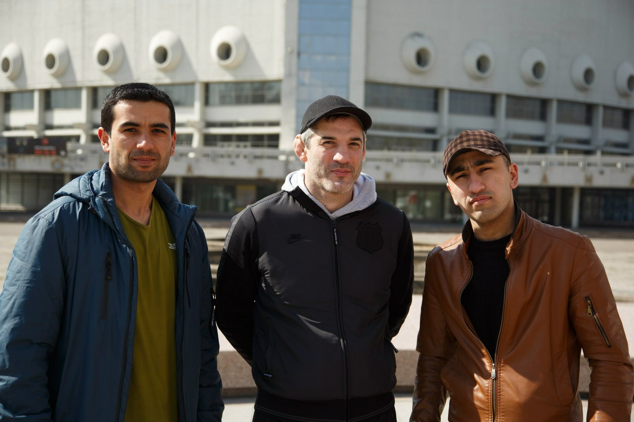 Бувайсар Сайтиев с таджики город Красноярска. Май 2014 Тоҷикӣ: Бувайсар Сайтиев бо тоҷикони шаҳри Красноярски Федератсия Руссия. Остров отдыха, назди Кохи варзиш. Майи 2014